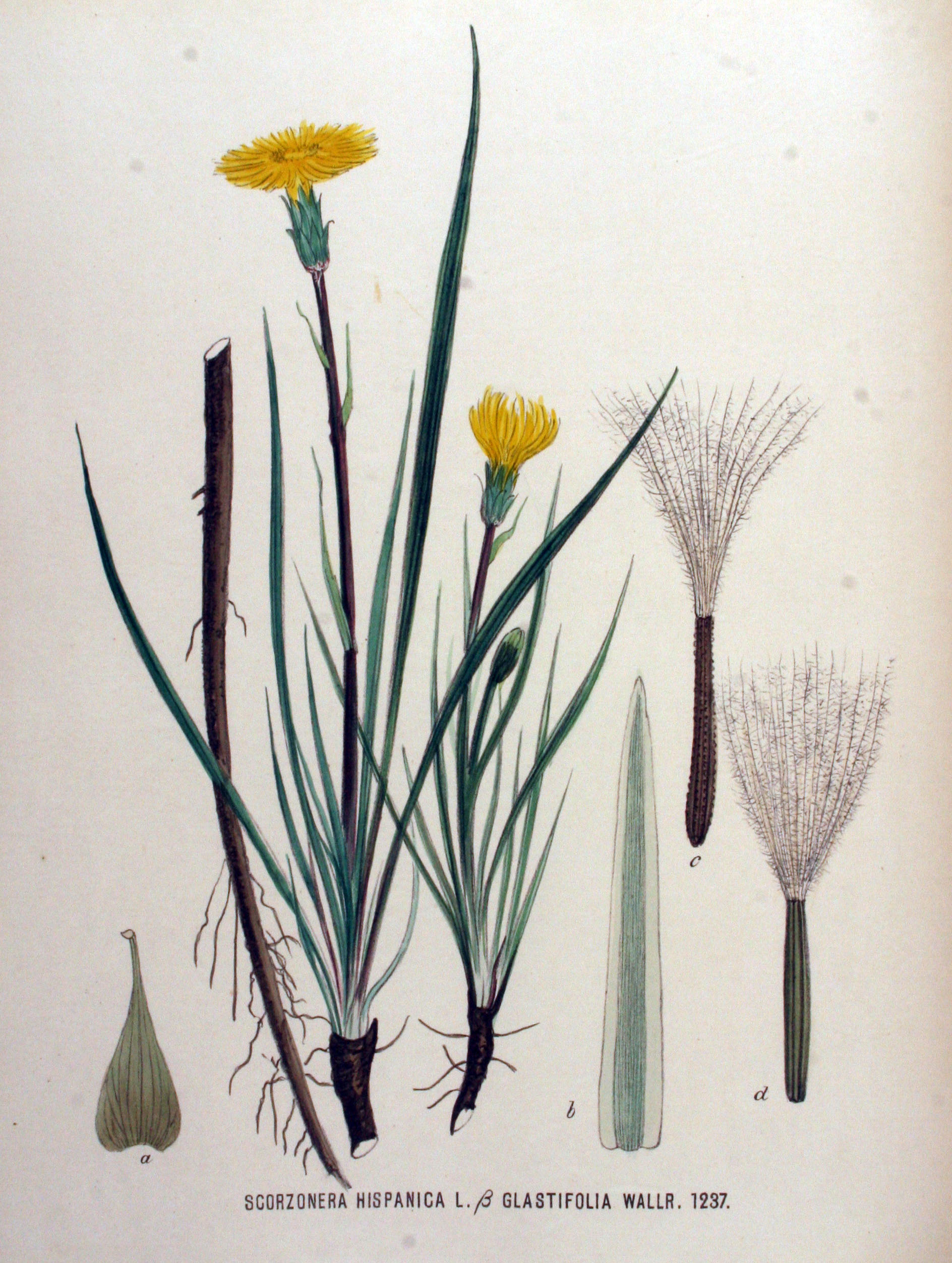 Scorzonera hispanica L. var. glastifolia (Willd.) W.D.J. Koch